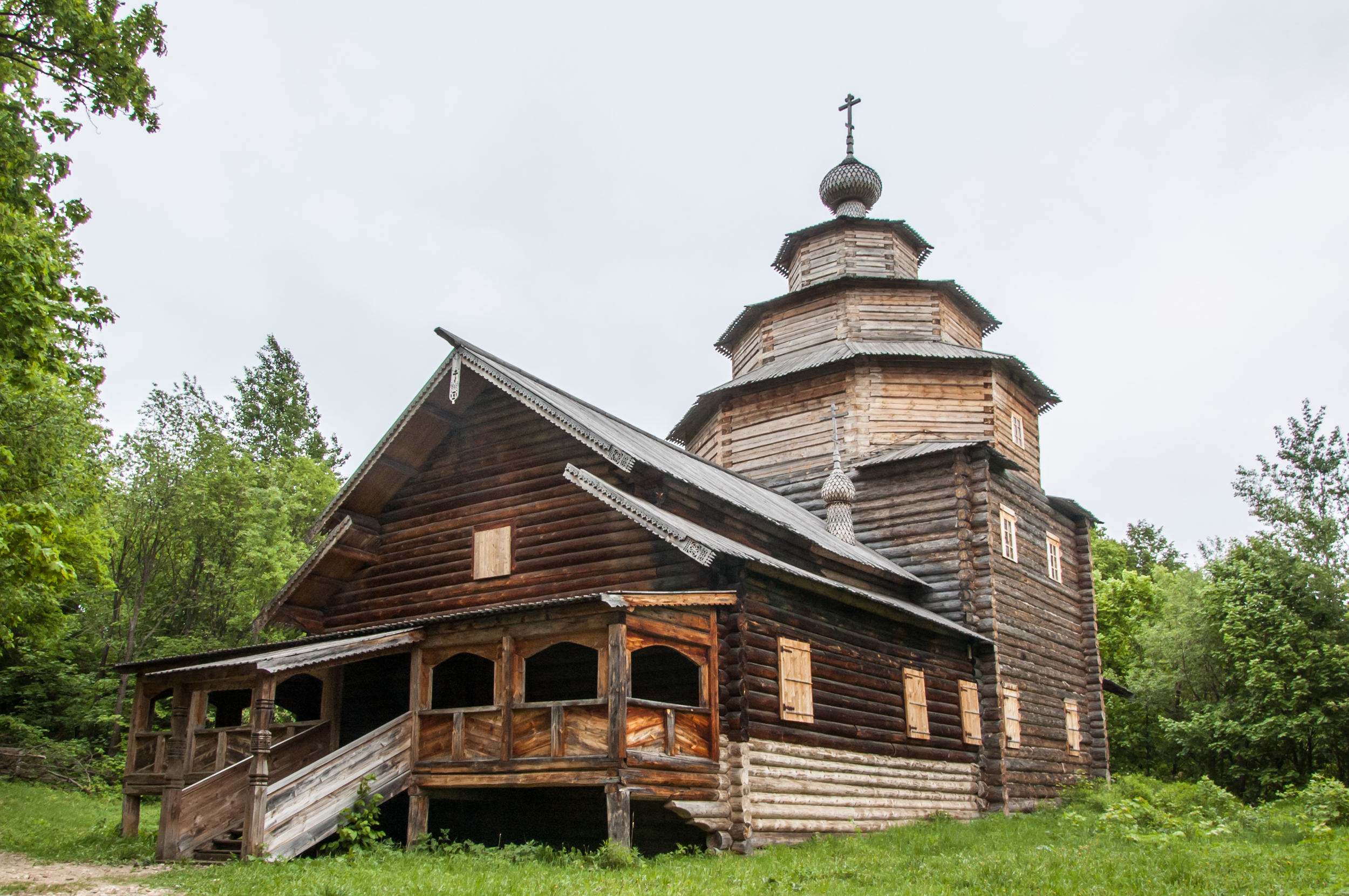 Церковь Покрова Пресвятой Богородицы из с. Старые Ключищи Кстовского р-на: улица Горбатовская, 41Б, Нижний Новгород, Нижегородская область